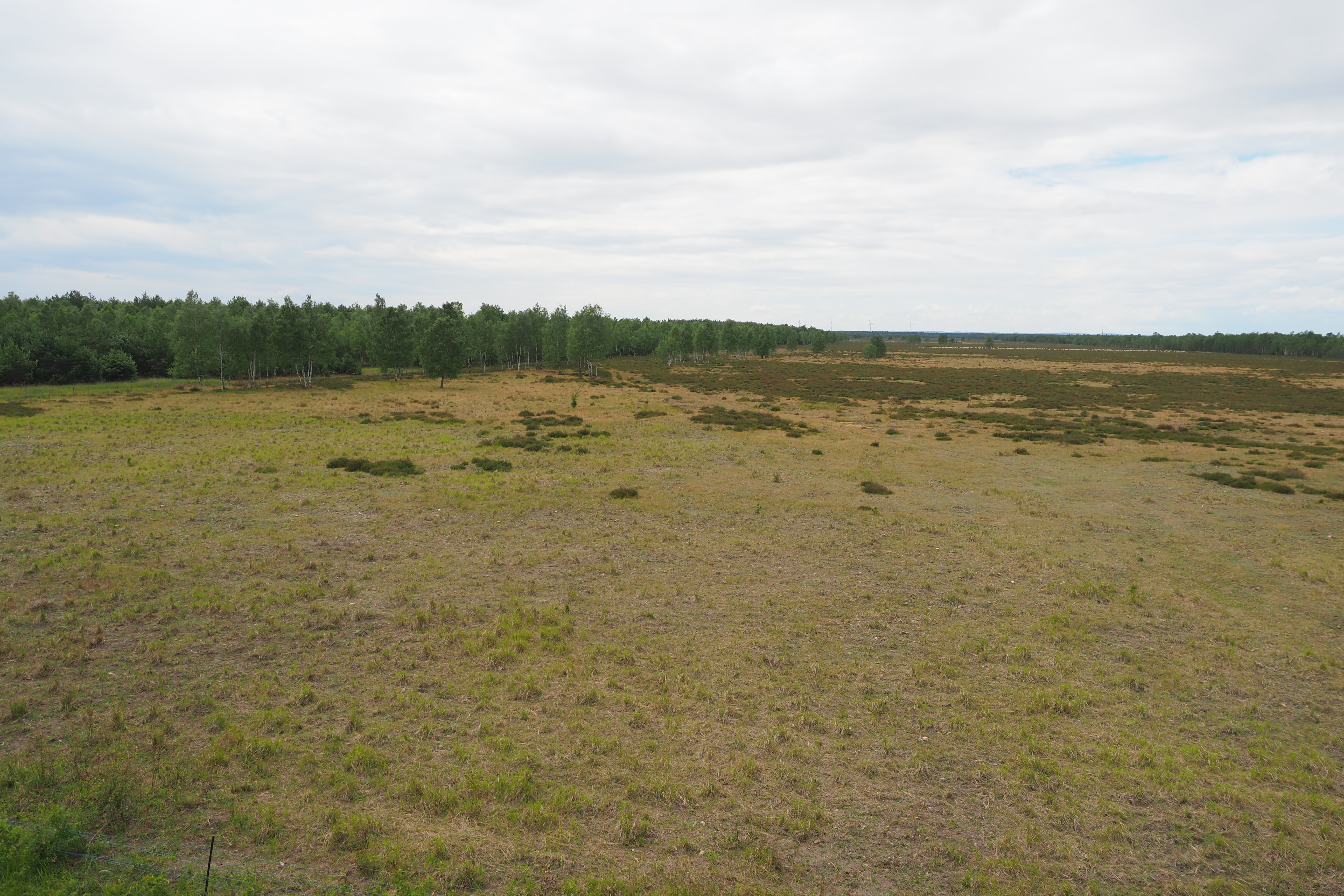 Gohrischheide im Naturschutzgebiet Gohrischheide und Elbniederterrasse Zeithain